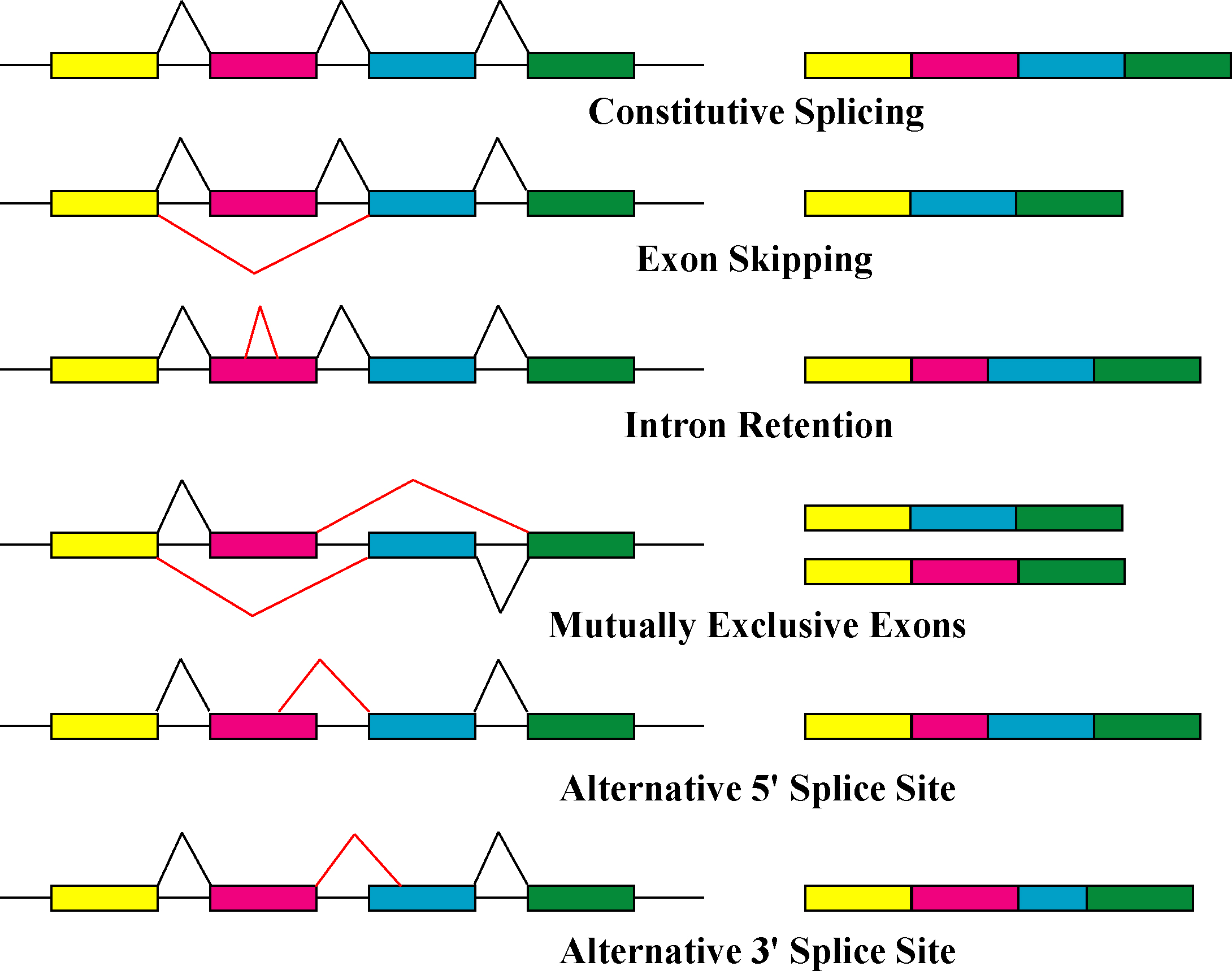 Übersicht über alternatives Splicing